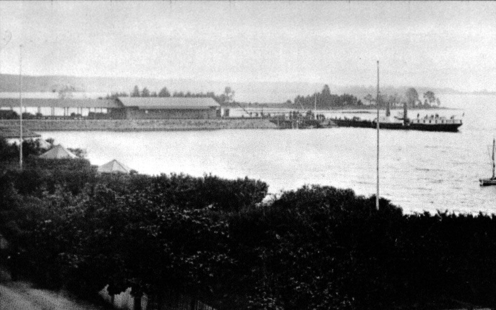 DS Skibladner, der unter Denkmalschutz stehende älteste noch in Betrieb befindliche Raddampfer der Welt auf einer historischen Aufnahme. Die Aufnahme entstand 1884 am Mjøsasee (Norwegen)